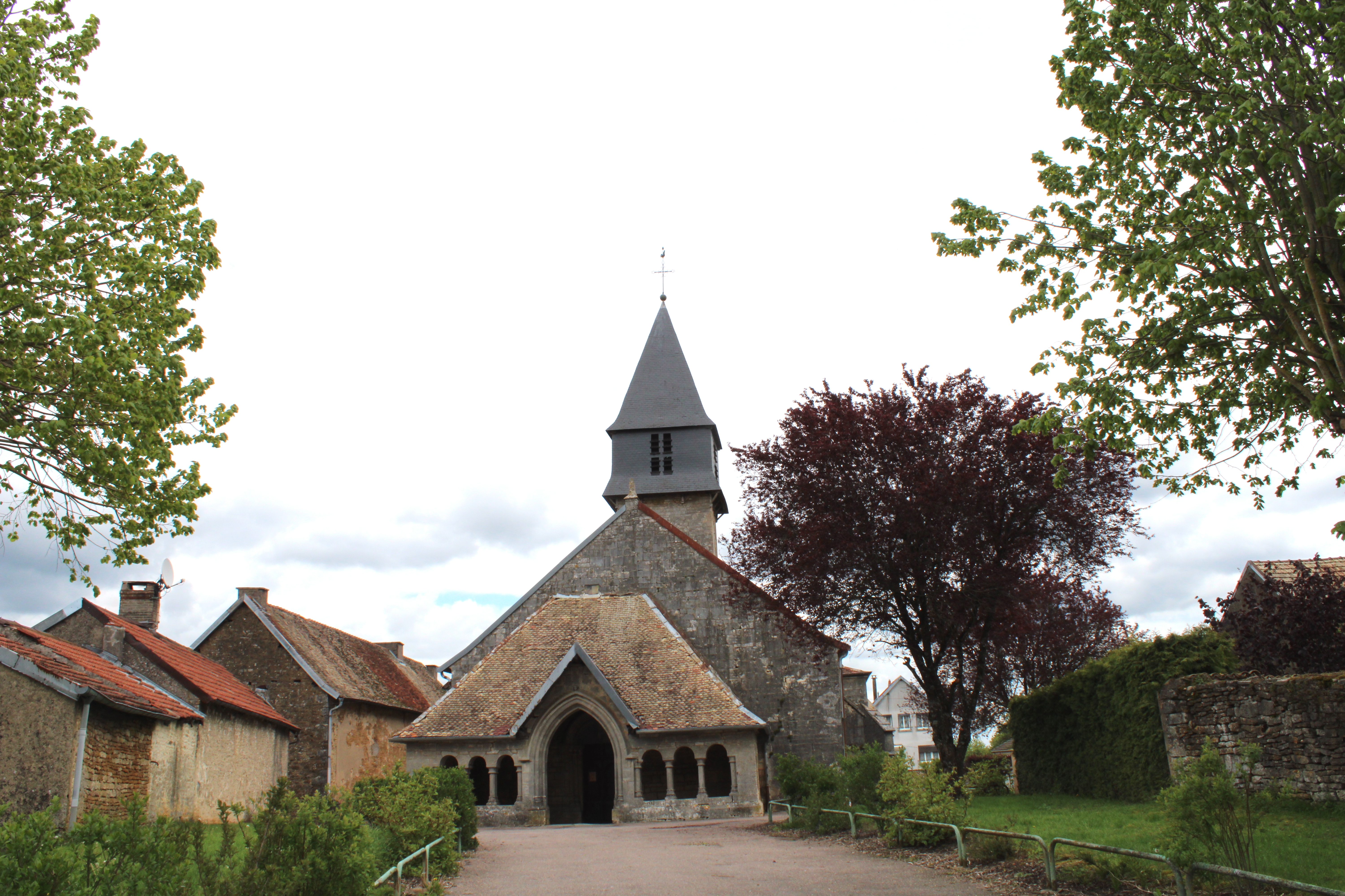 Vue de l'église